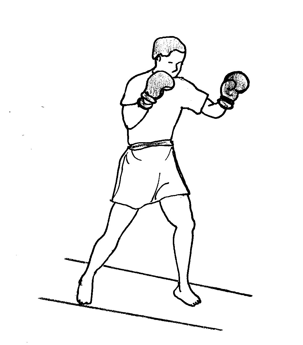 garde_mixte1.jpg